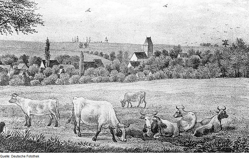 Original image description from the Deutsche Fotothek Schmirchau. Ortsansicht mit Bockmühle